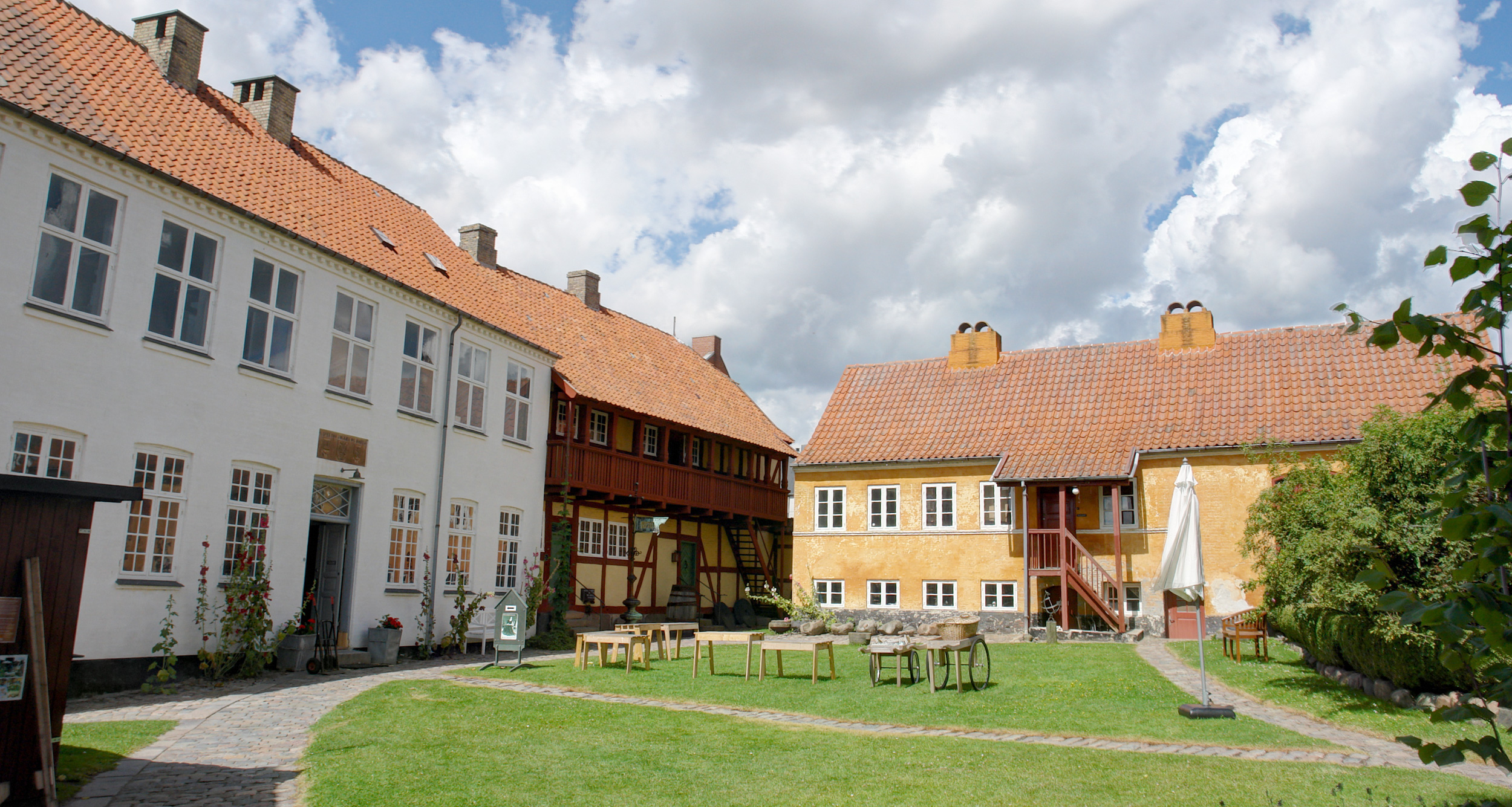 Holbæk Museum: Friskole: Die Freischule wurde 1867 gebaut und erhielt 1888 das zweite Stockwerk, Købmandsgården: 1660 erbaut, Bagstræde 8: 1846 erbaut